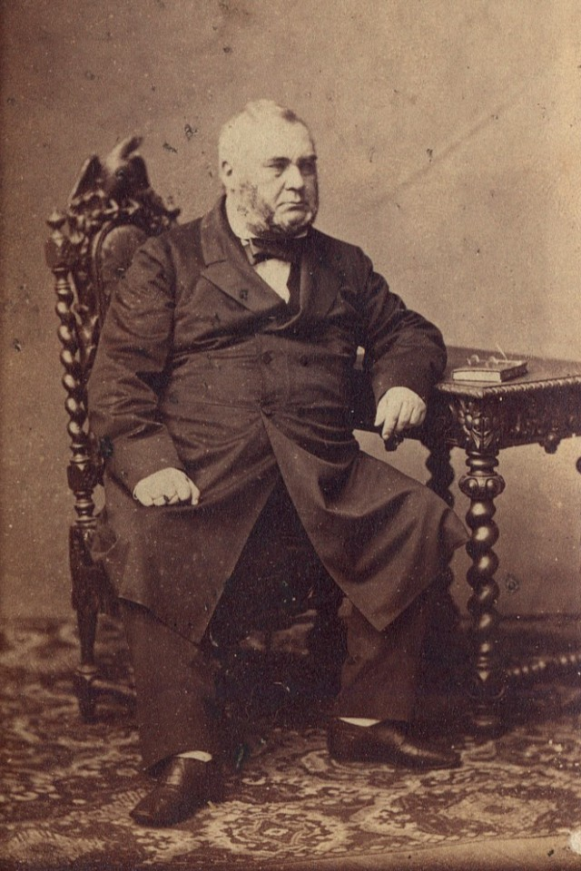 margriabia Aleksander Wielopolski